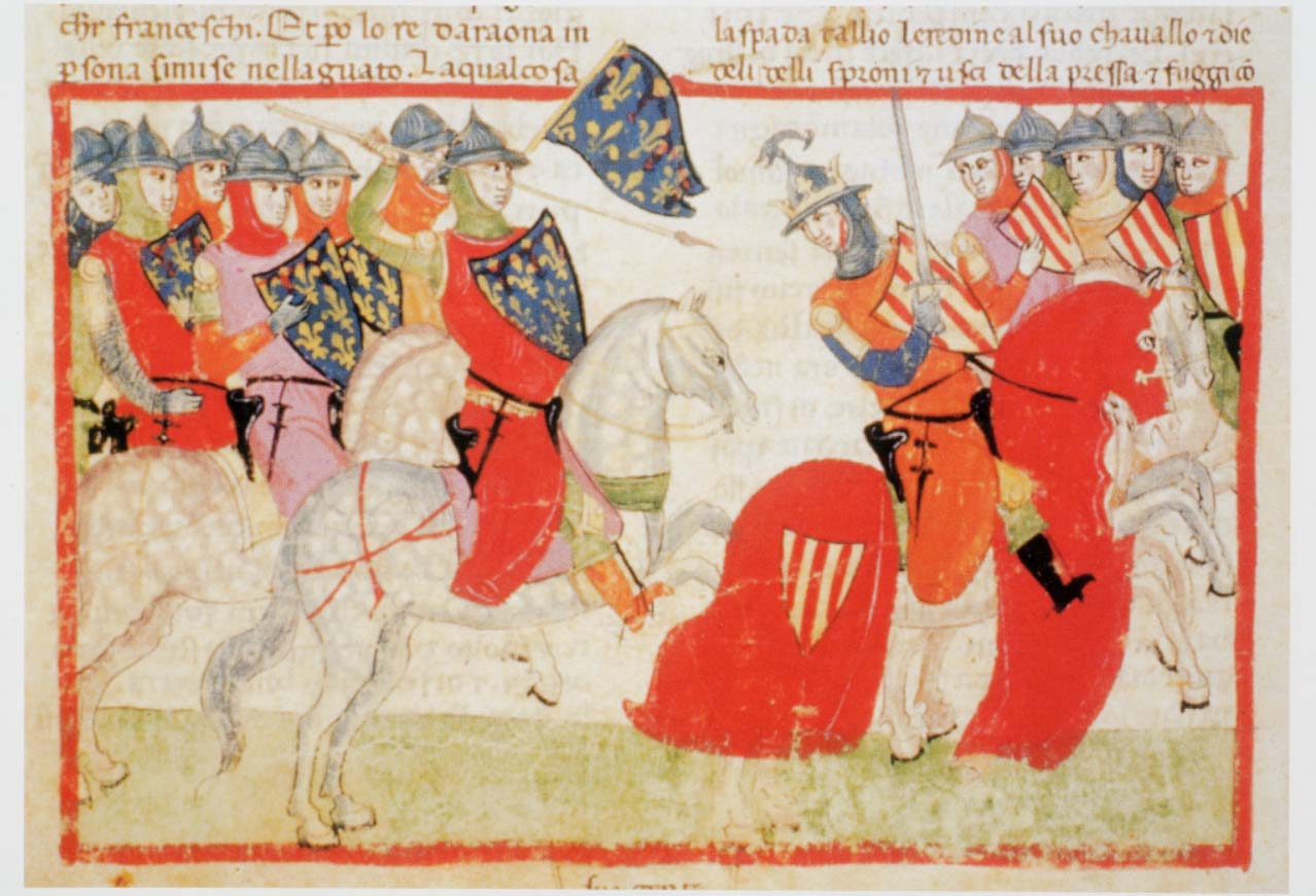 Nuova cronica. f.137v (1.VIII,103) ms. Chigiano L VIII 296. Pere III d'Aragó és ferit l’any 1285.